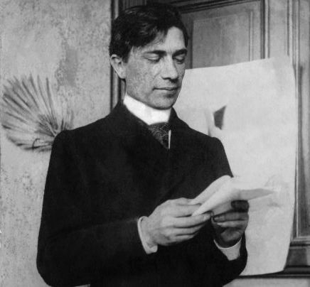 Stefan Luchian, fotografie înainte de anul 1900